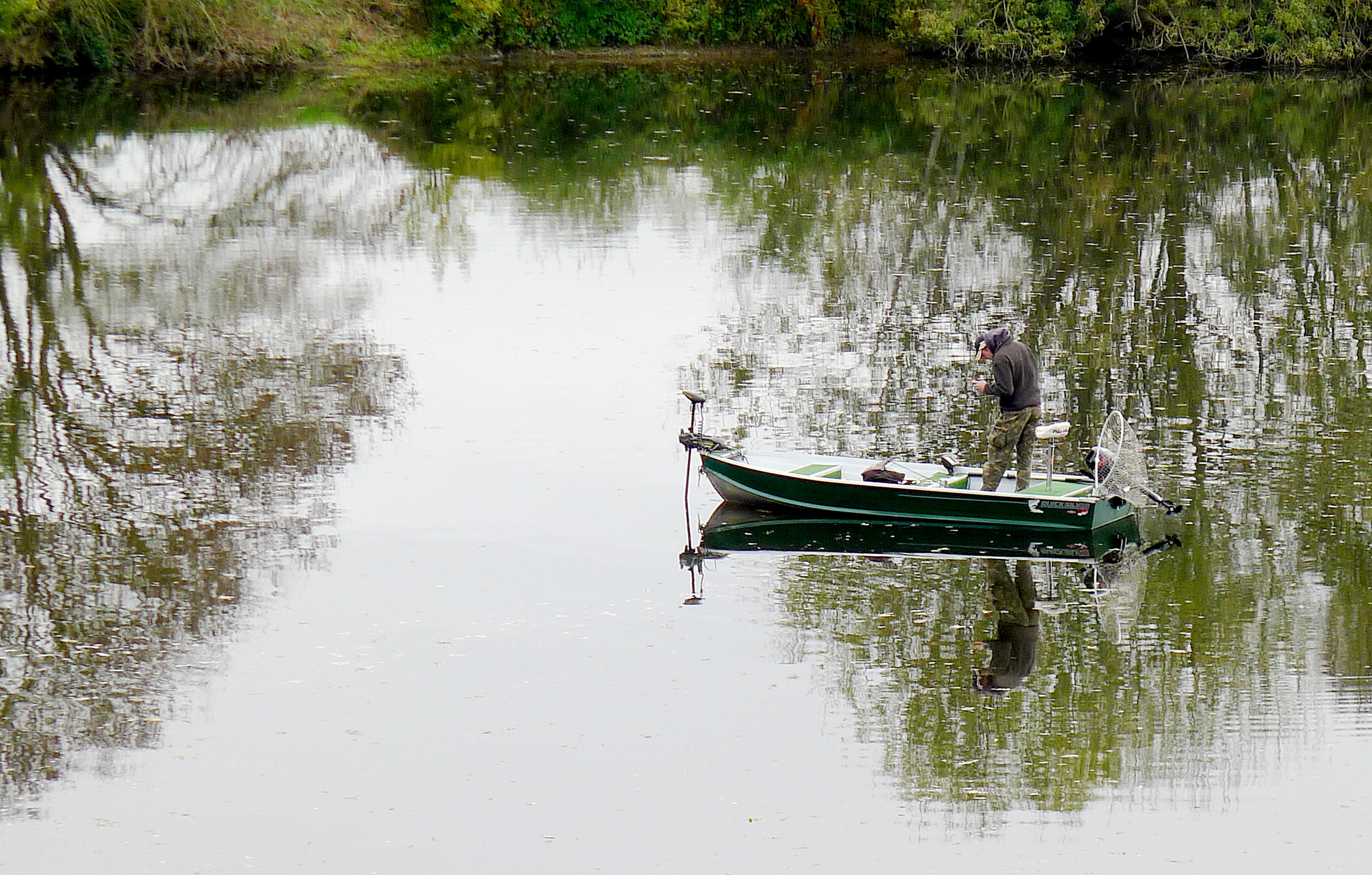 Pêcheur sur la Mayenne, entre le Lion-d'Angers et Grez-Neuville - Maine-et-Loire (France)